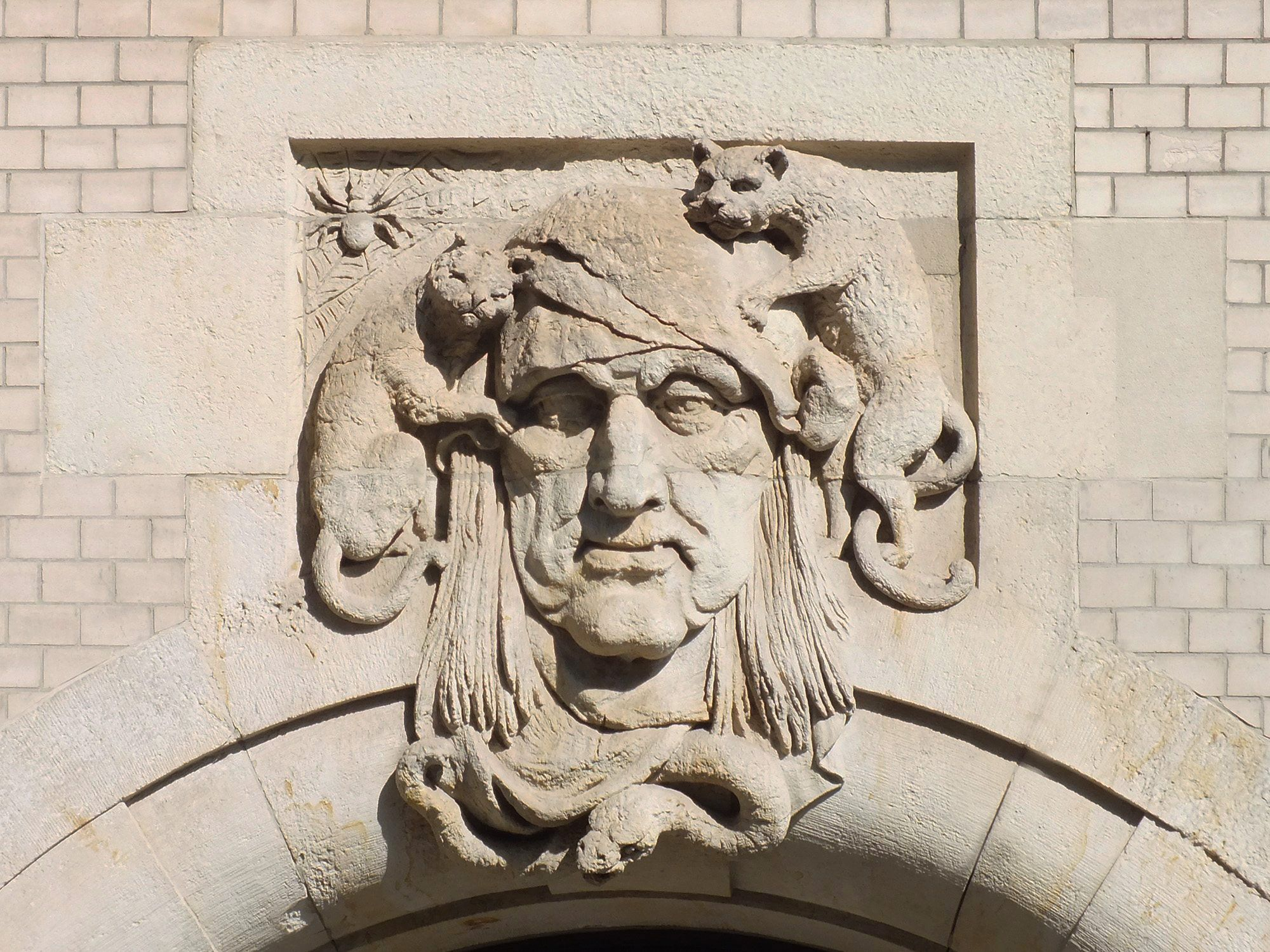 Supraporte am Märchenhaus Philipp-Rosenthal-Straße 21 in Leipzig